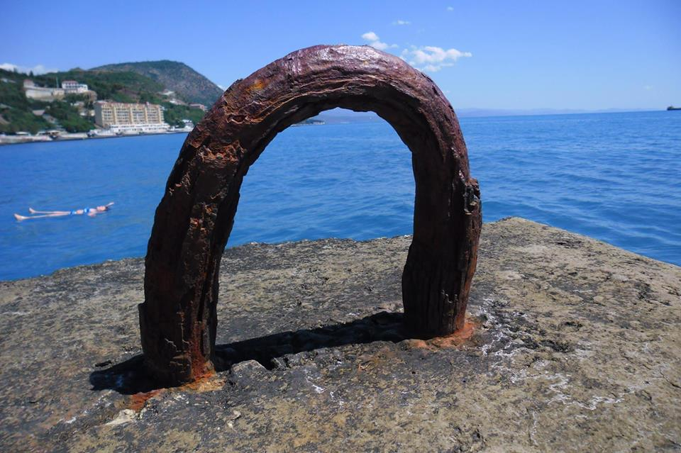 Іржа